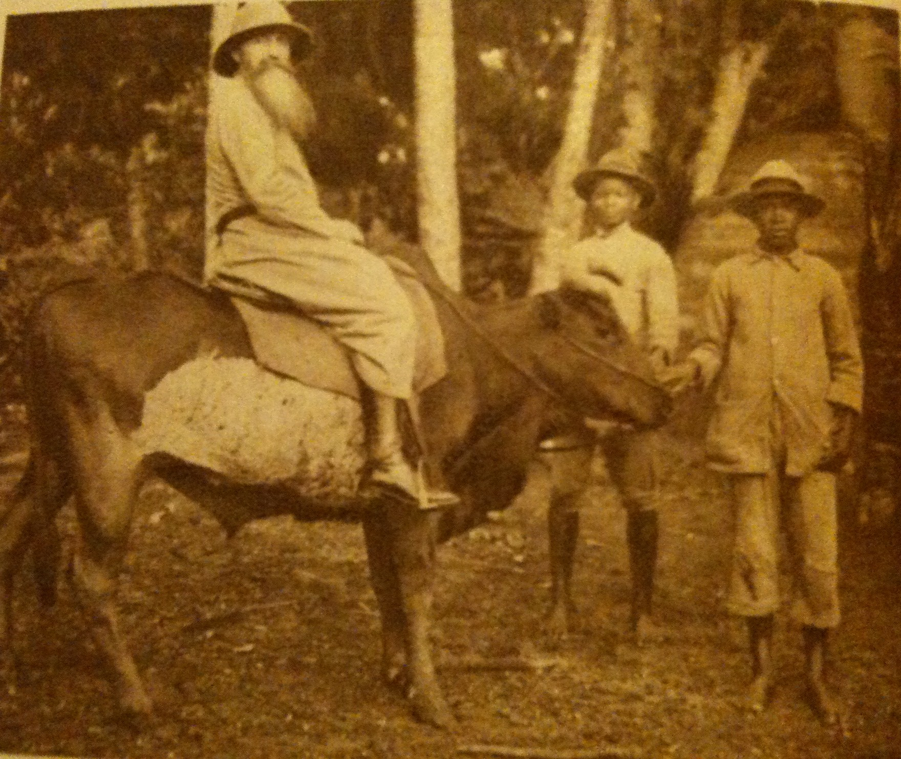 Le R.P. Raimbault ??? en tournée de ministère sur l'île de Diégo-Suarez.